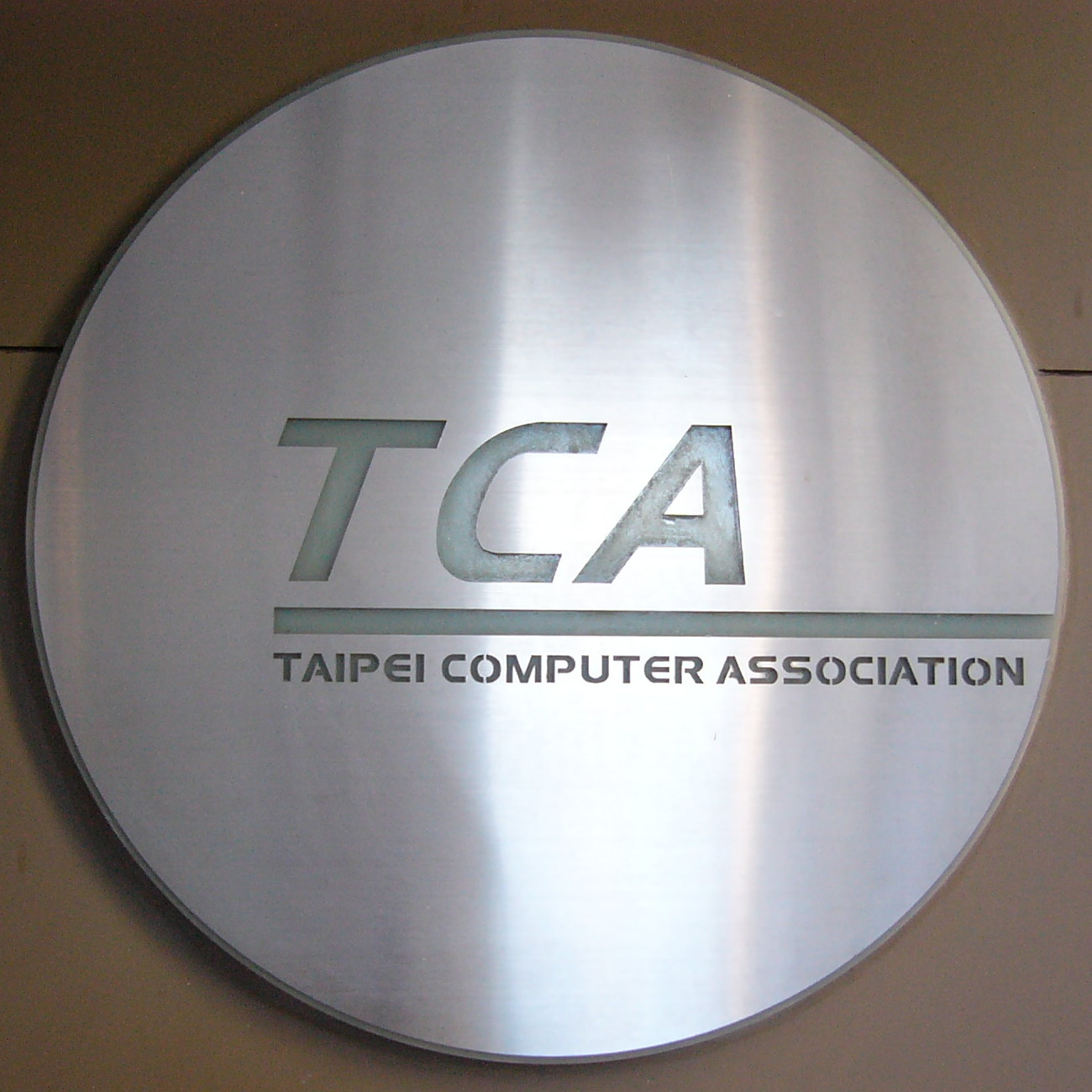 三傑大廈外牆，台北市電腦商業同業公會總部銘板。